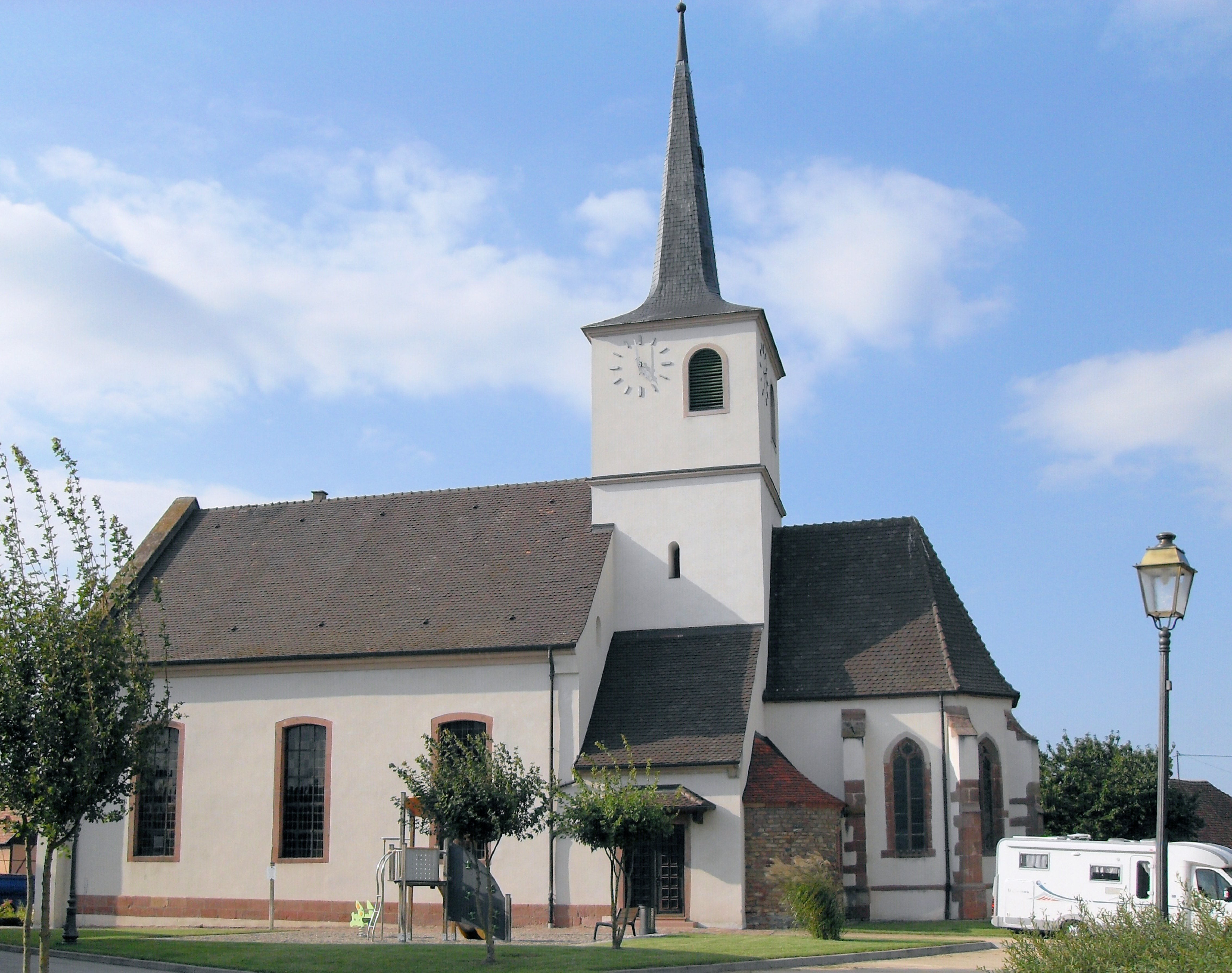 L'église Saint-Martin, puis temple luthérien à Jebsheim